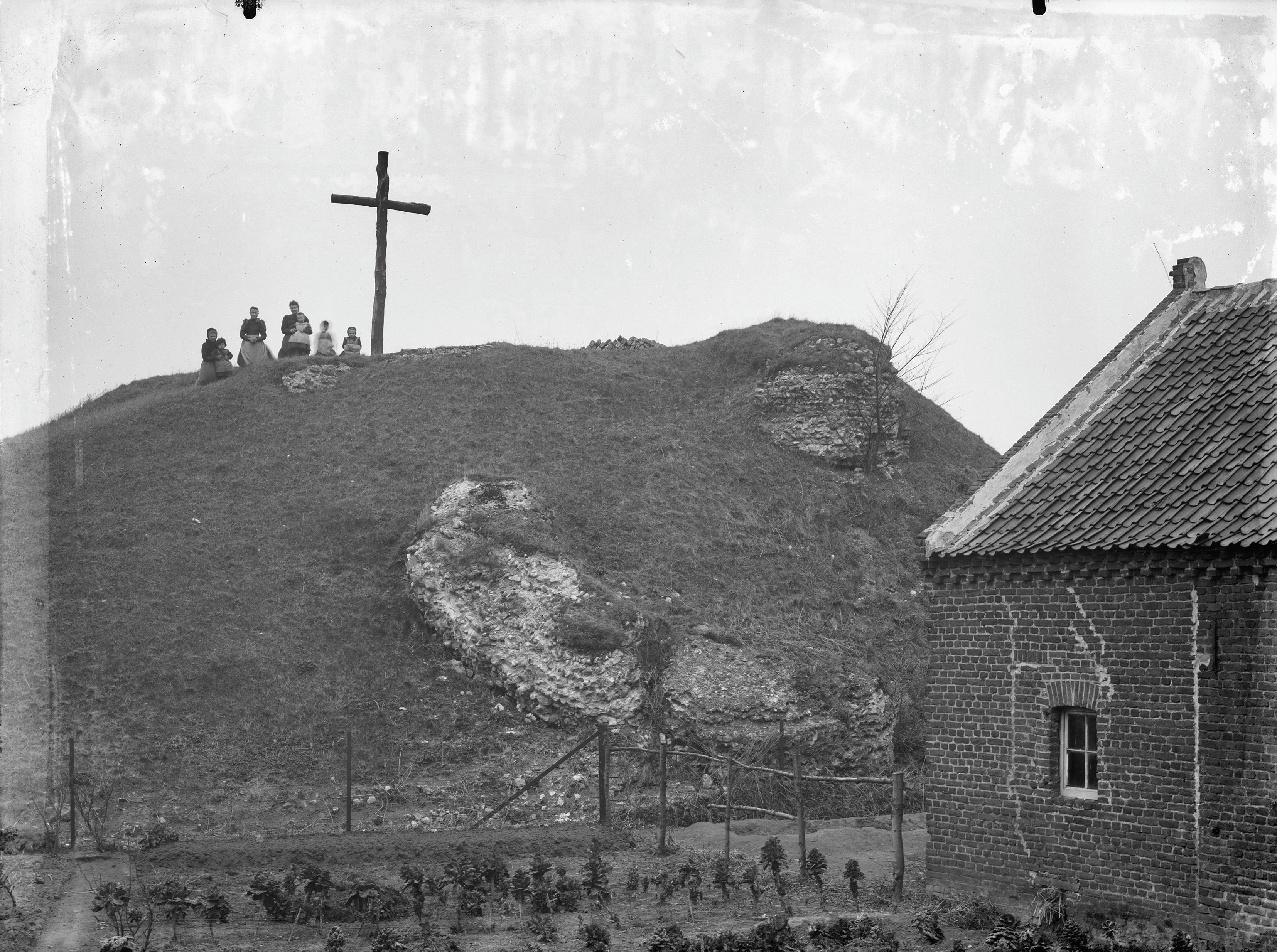 Kasteel/ Ruïne: Overblijfselen van kasteel , heuvel met houten kruis en poserende mensen (opmerking: Collectie Mulder)